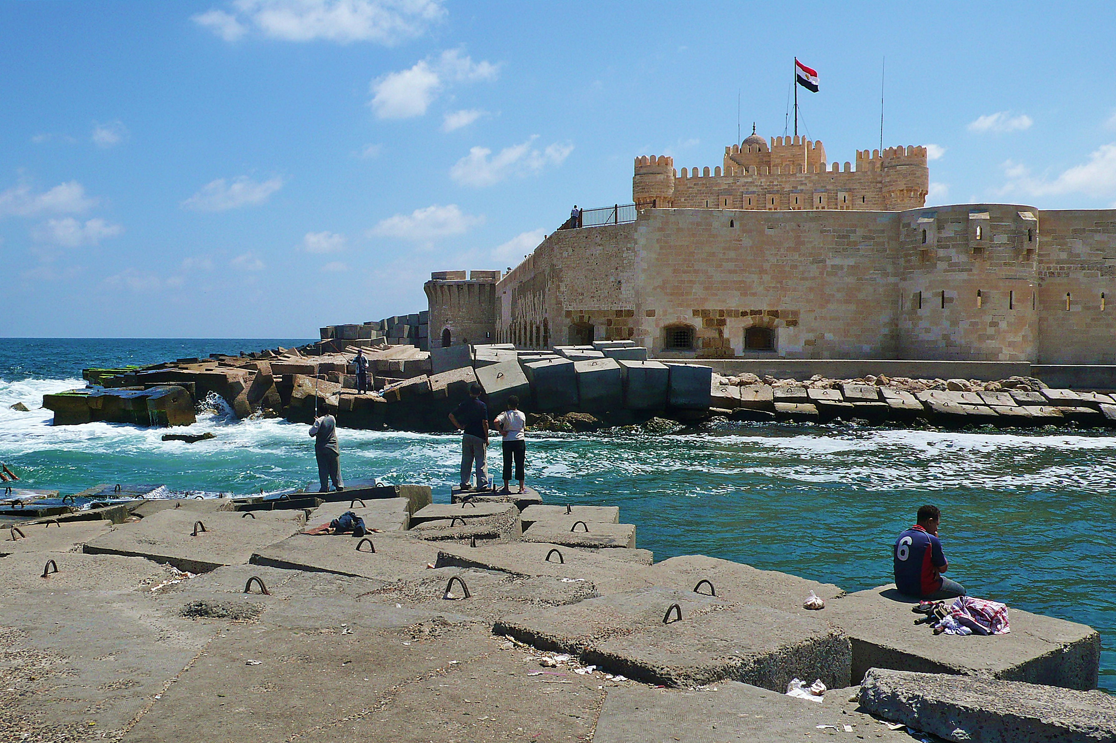 egipto